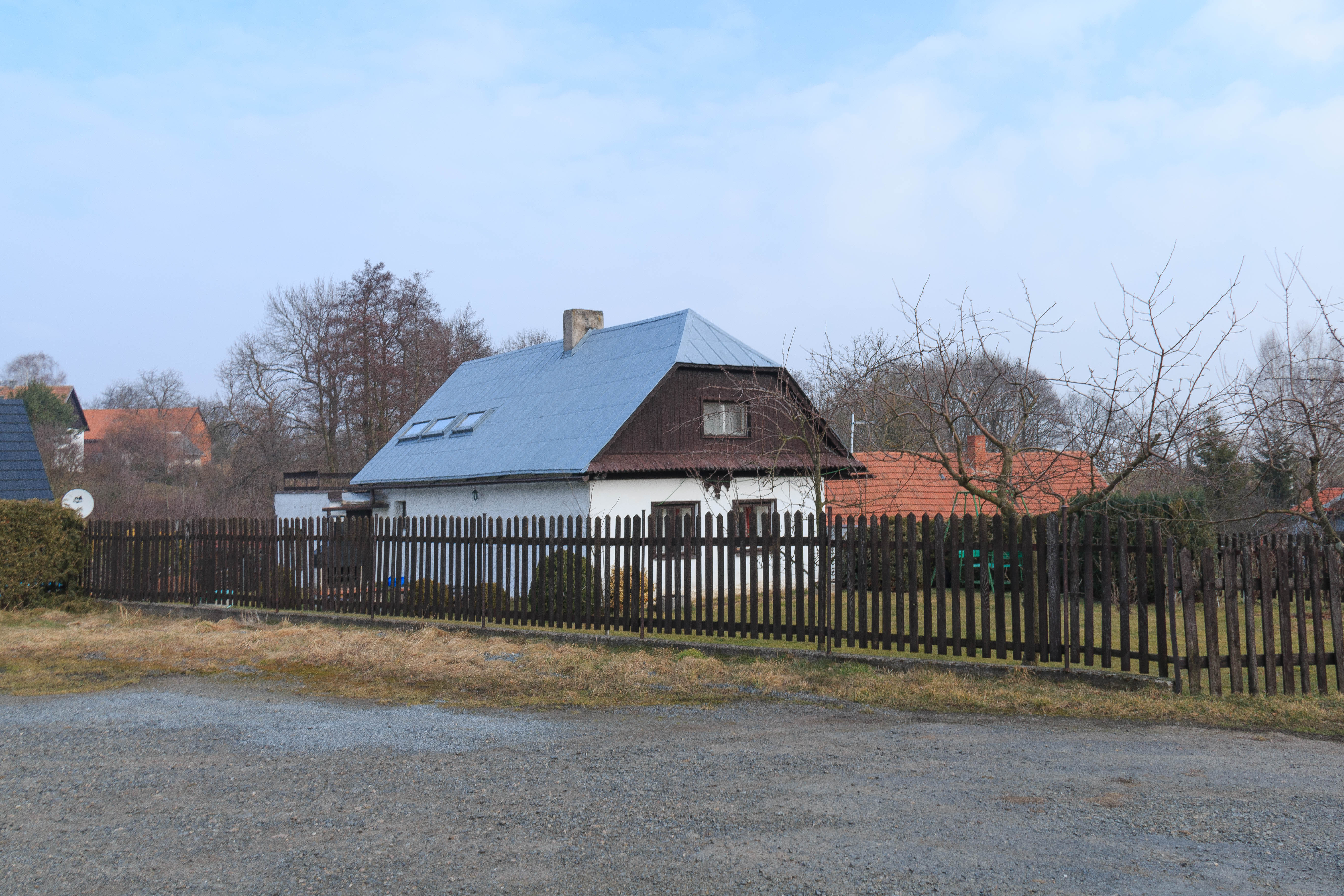 Kvítek ev. č. 1